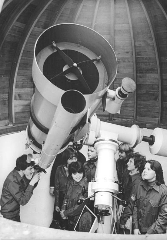 Suhl, Jugendstunde im Planetarium ADN-ZB Schaar 2.5.80-reh-Suhl: Die Schüler der Erich-Weinert OS Ohrdruf erleben eine interessante Jugendstunde in der Schul- und Volkssternwarte K.E. Zielkowski in Suhl. Das 40 cm-Cassegrain Spiegelteleskop bietet eine gute Sicht. (siehe auch 15N und ADN-Meldg. am 4.5.80)